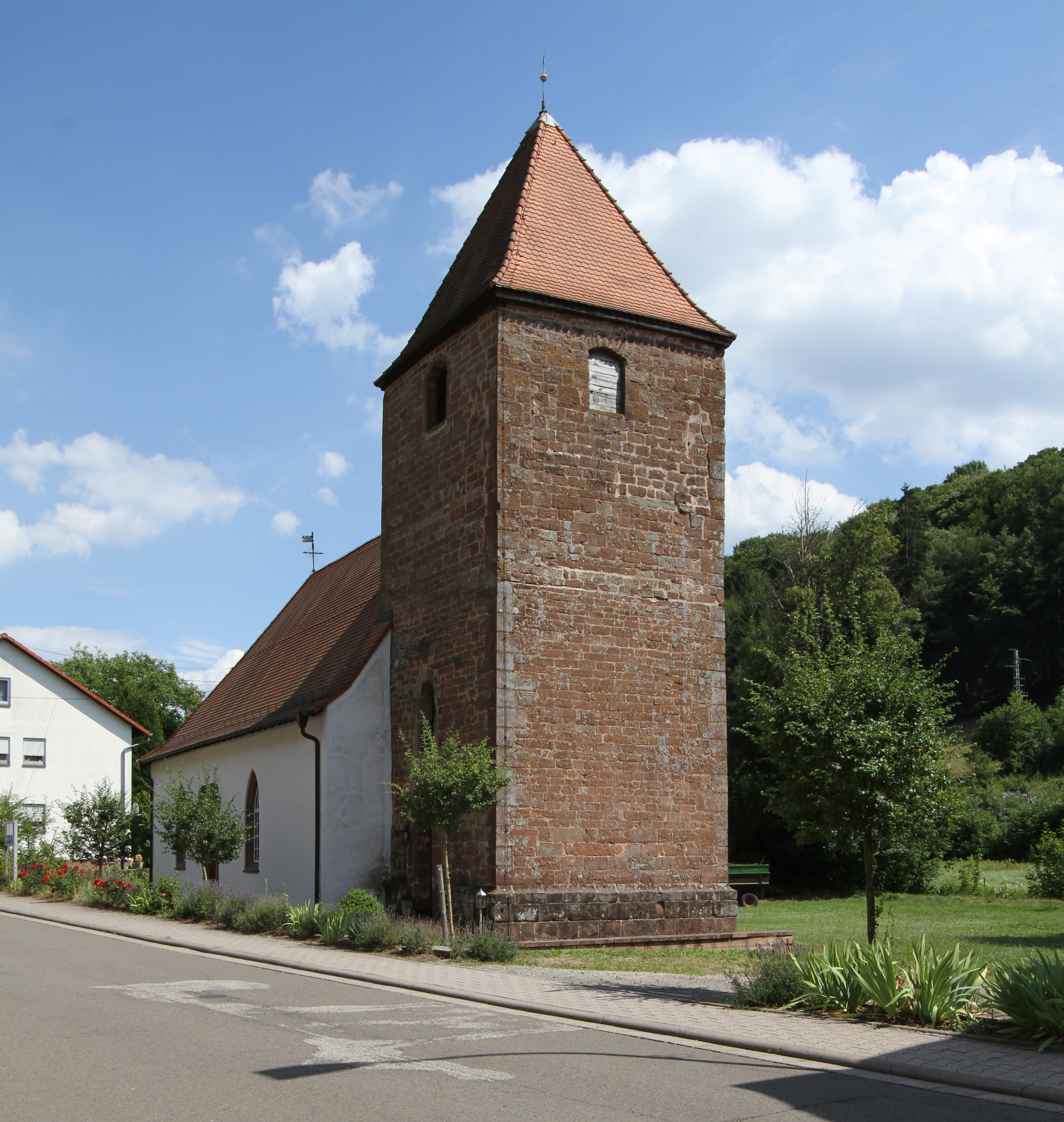 Evangelische Kirche in Winterbach/Pfalz